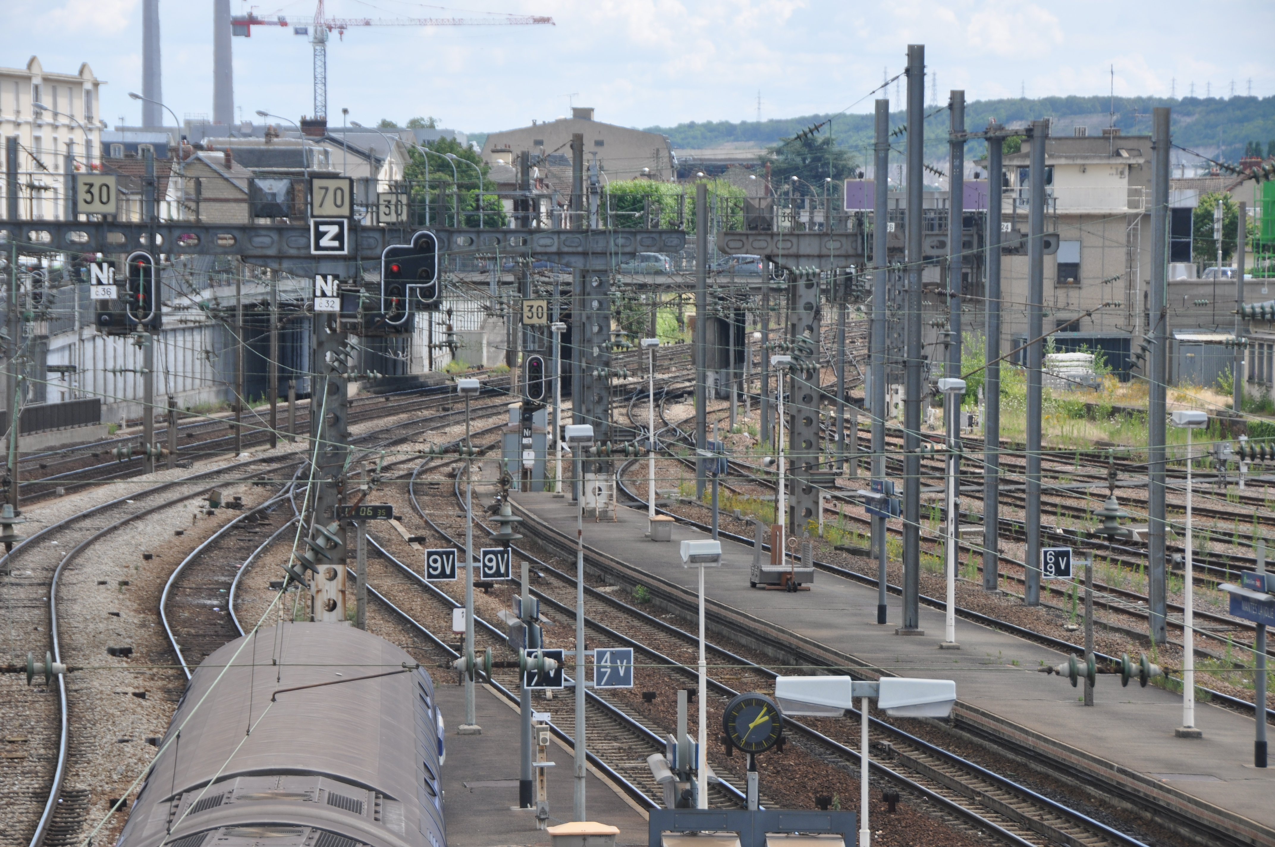 Gros plan de l'entrée est de la gare de Mantes-la-Jolie depuis la passerelle transversale. On distingue au fond les bifurcations de Caen et d'Argenteuil, où se détache la ligne de Mantes-la-Jolie à Cherbourg de la ligne de Paris-Saint-Lazare au Havre.